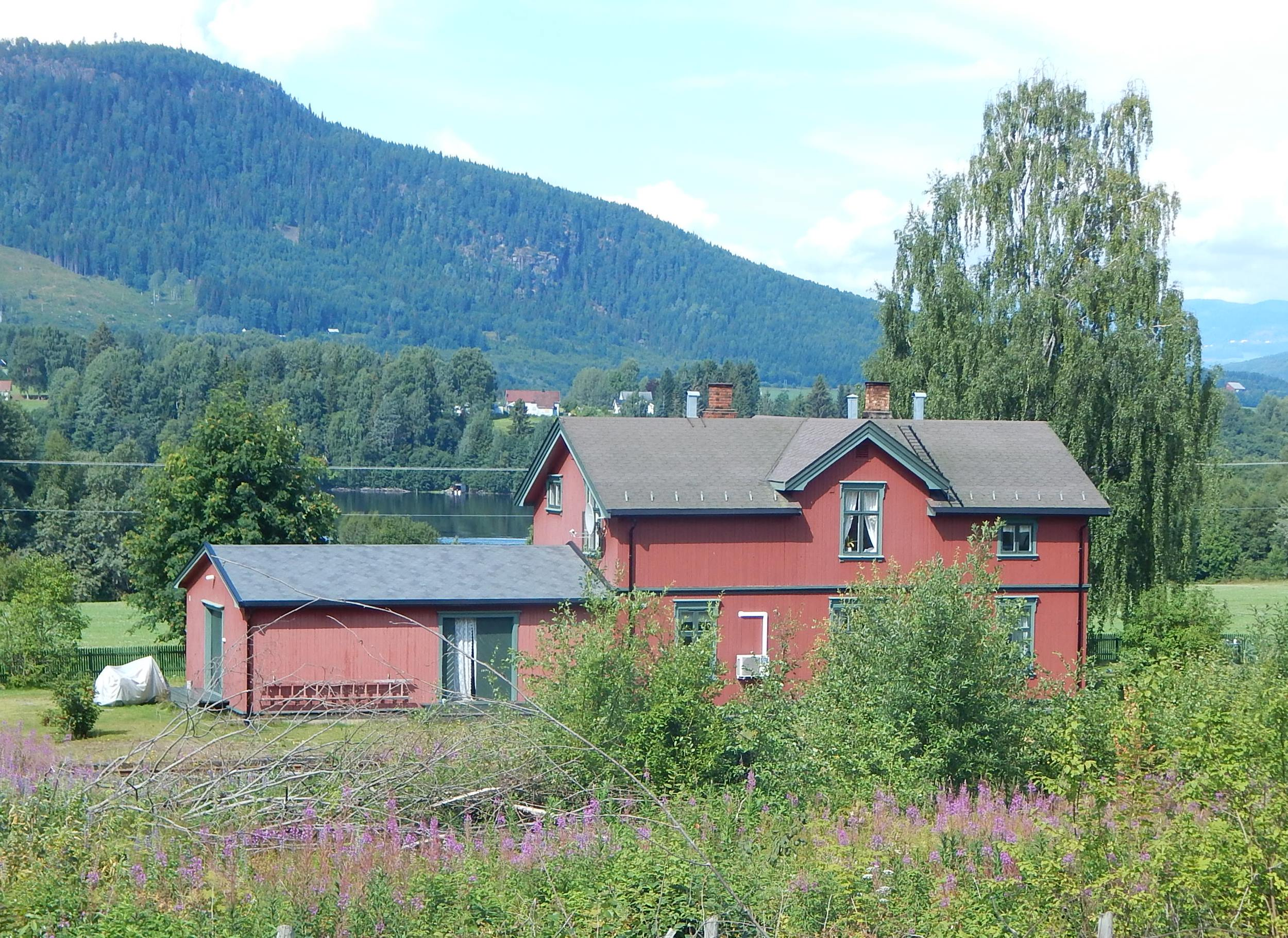 Fluberg stasjon